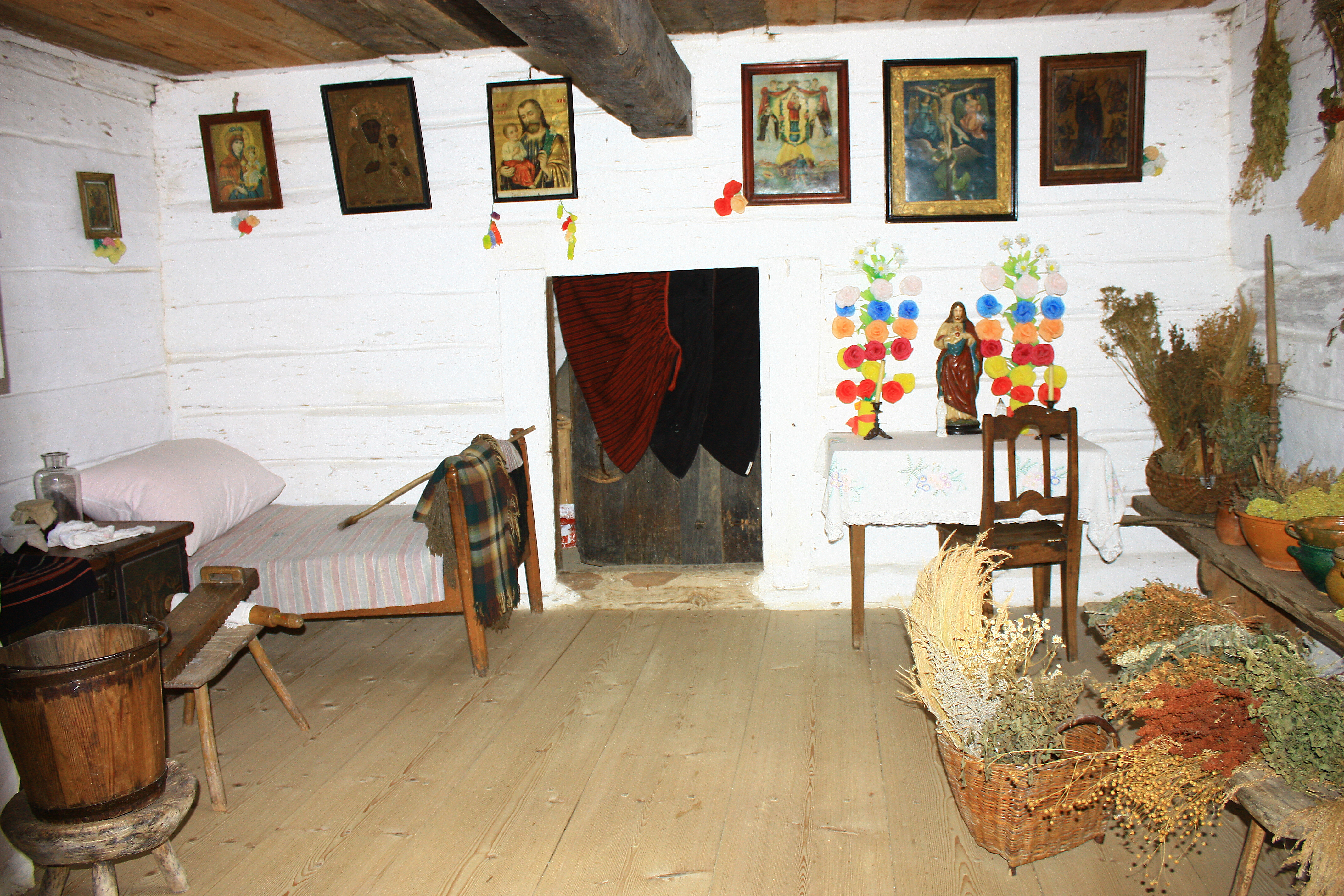 Tokarnia, teren parku etnograficznego Muzeum Wsi Kieleckiej